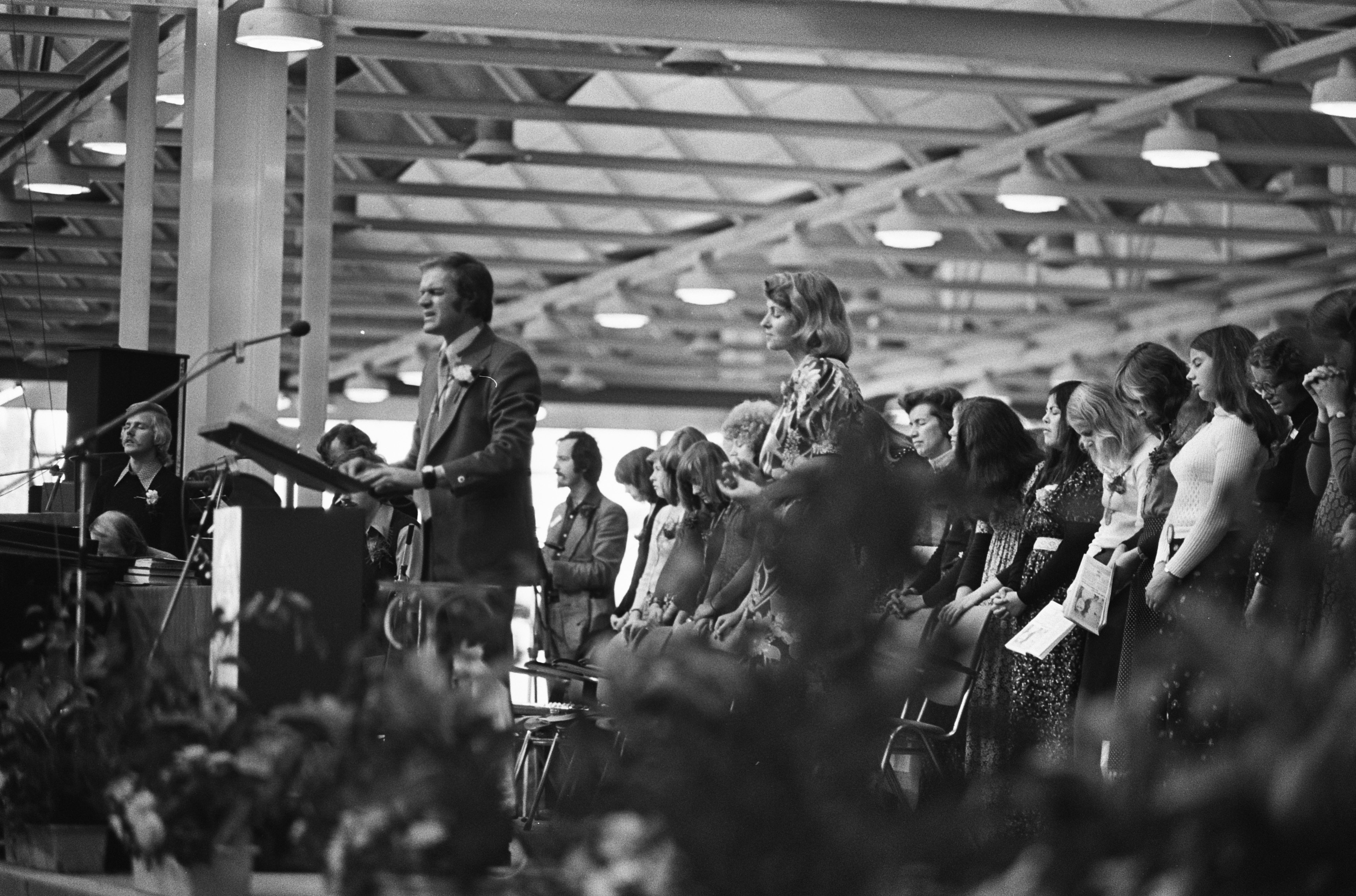 Collectie / Archief : Fotocollectie Anefo Reportage / Serie : [ onbekend ] Beschrijving : Evangelist Ben Hoekendijk houdt "One way day" in Julianahal, Utrecht; Ben Hoekendijk aan het woord Datum : 18 oktober 1975 Locatie : Utrecht Instellingsnaam : Julianahal Fotograaf : Bogaerts, Rob / Anefo Auteursrechthebbende : Nationaal Archief Materiaalsoort : Negatief (zwart/wit) Nummer archiefinventaris : bekijk toegang 2.24.01.05 Bestanddeelnummer : 928-2135